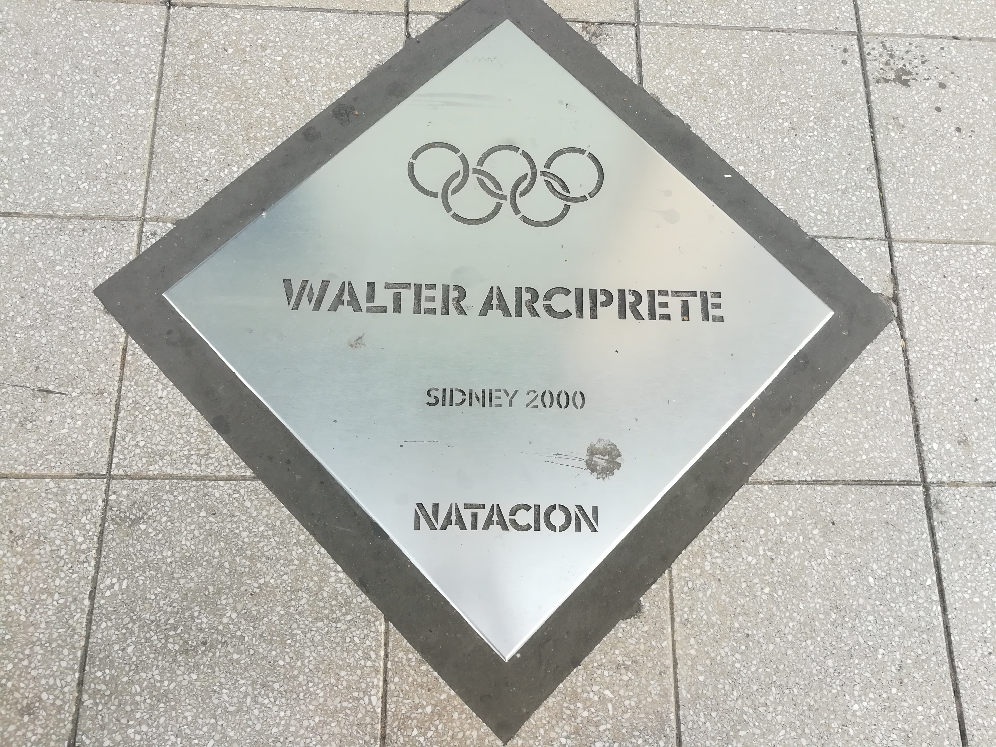 Paseo de los Olímpicos de los en la Avenida Pellegrini (Rosario).